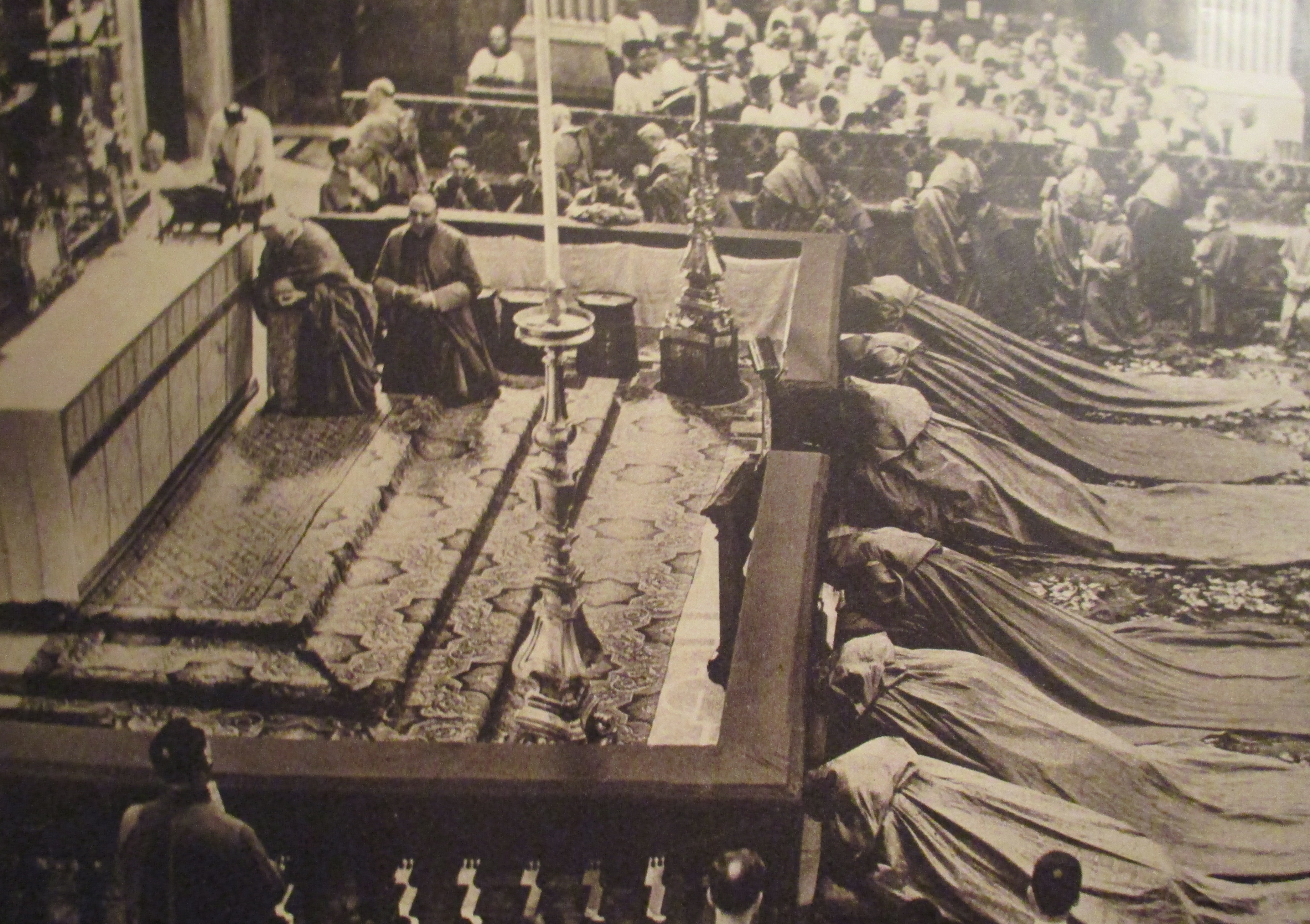 Consistoire à la basilique Saint-Pierre sous le pontificat de Pie XI: photographie parue dans L'Illustration, hors série de février 1939.